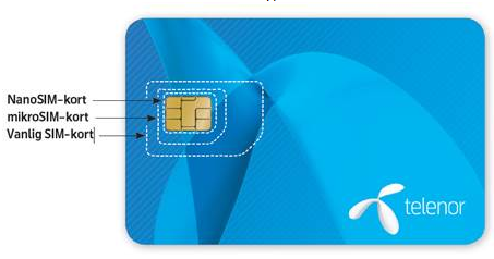 SIM-kort fra Telenor